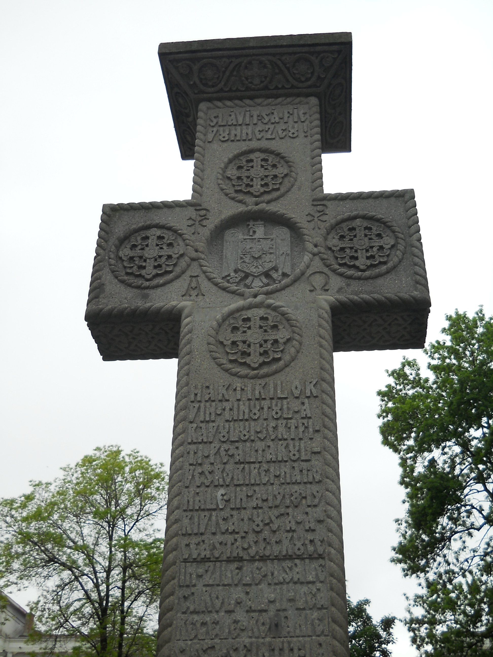 Crucea martirilor, vedere dintr-o parte